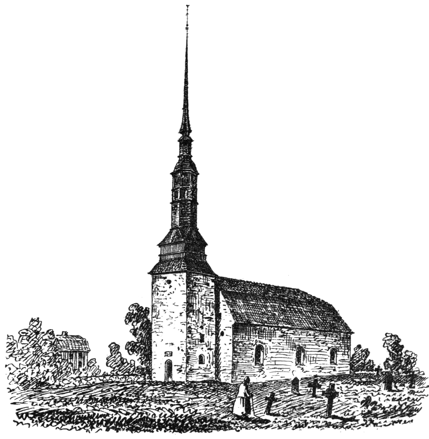 Horns kyrka i Östergötland. Teckning i "Utdrag af Antiqvitets-Intendenten P. A. Säves afgifna berättelse för år 1861", publicerad i Antiqvarisk tidskrift för Sverige band 1, 1864.